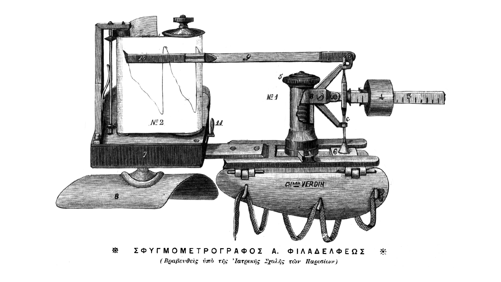 Pulsmessgerät. Griechische Erfindung, 19. Jahrhundert